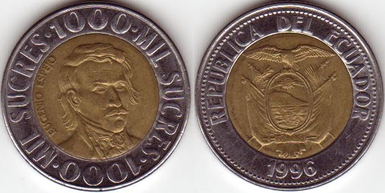 Ecuadorian 1000 Sucres coin